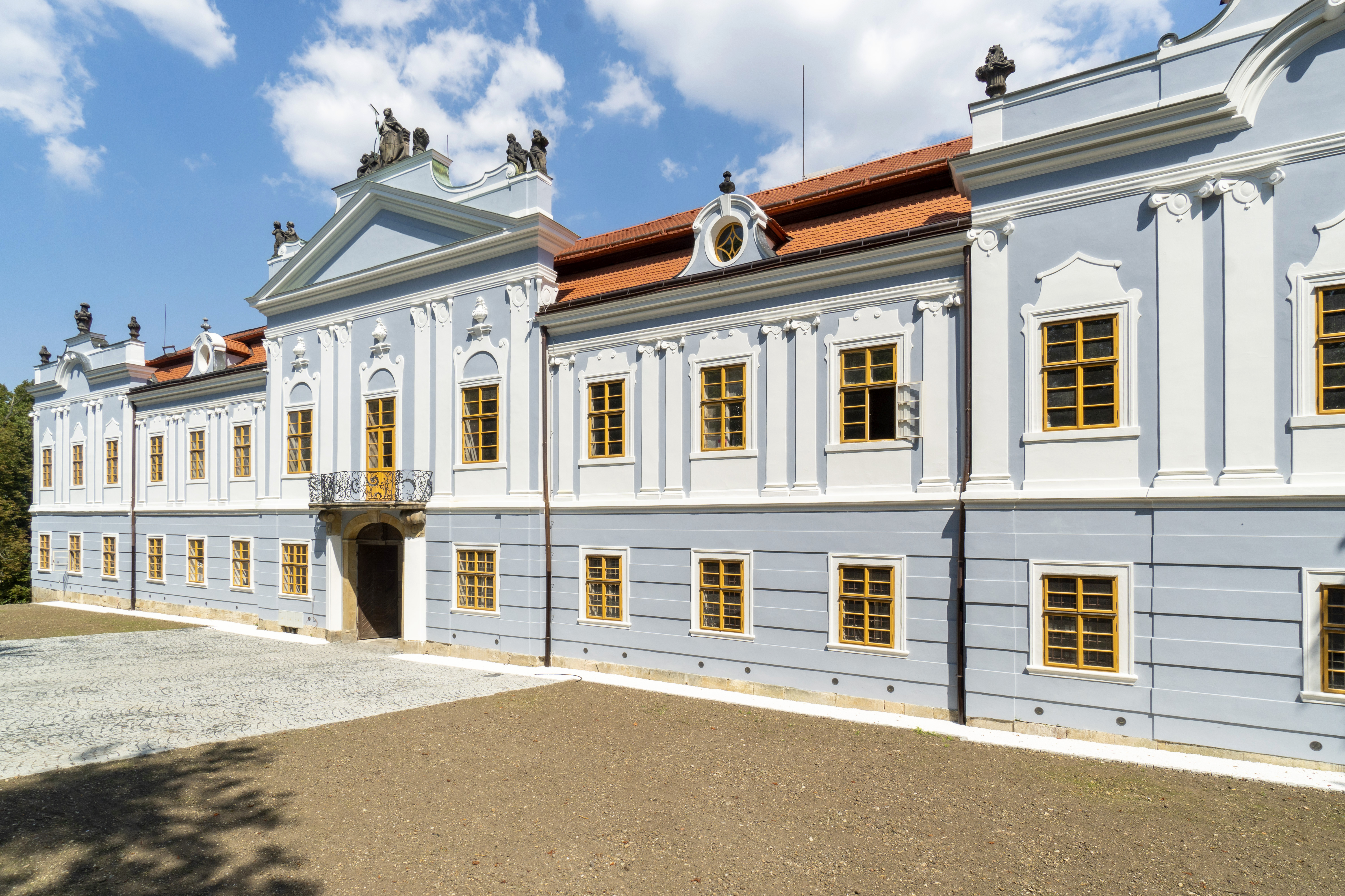 Hlavní západní zámecké průčelí